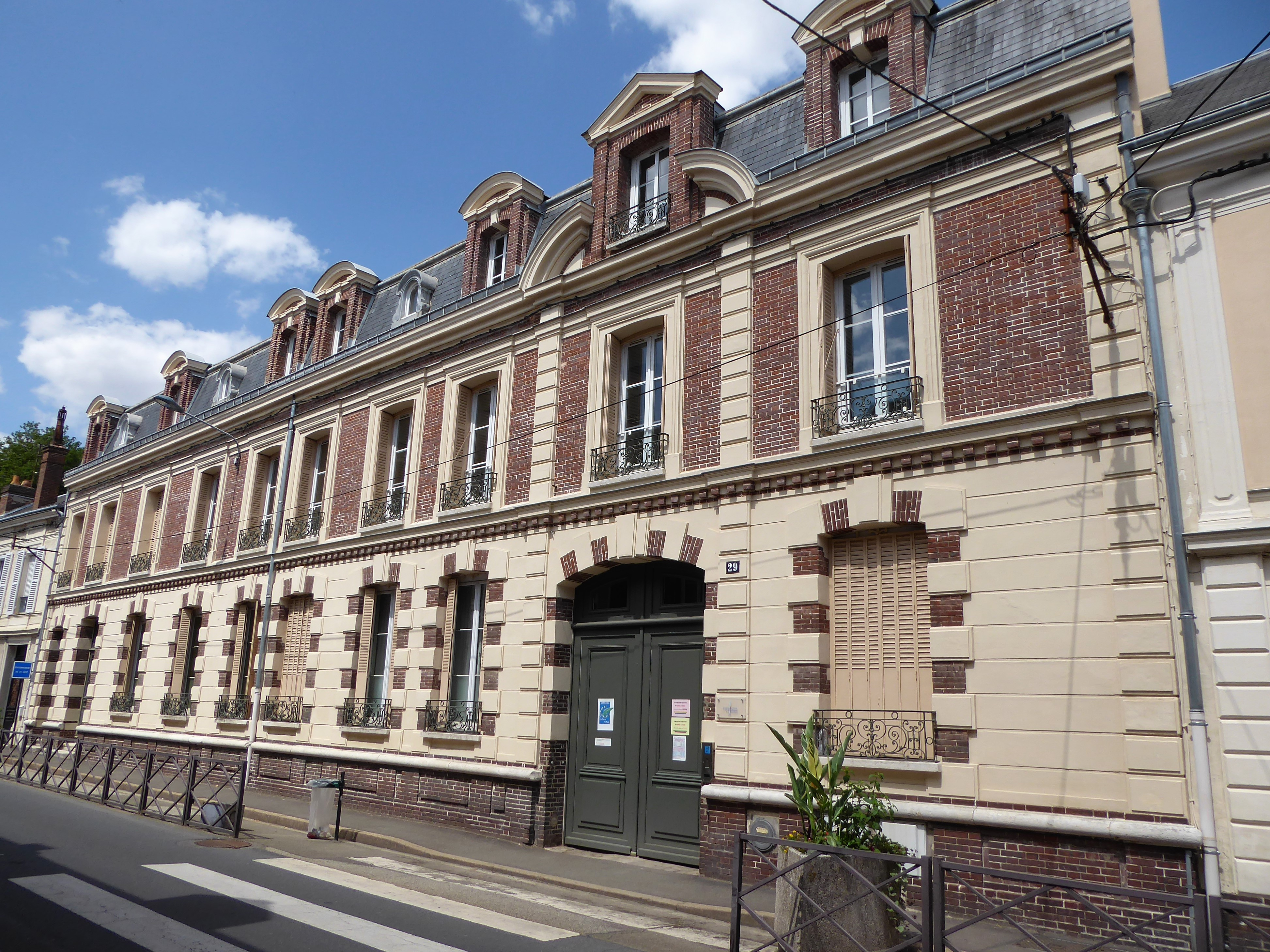 lycée privé Saint-Pierre-Saint-Paul, Dreux, Eure-et-Loir, France.